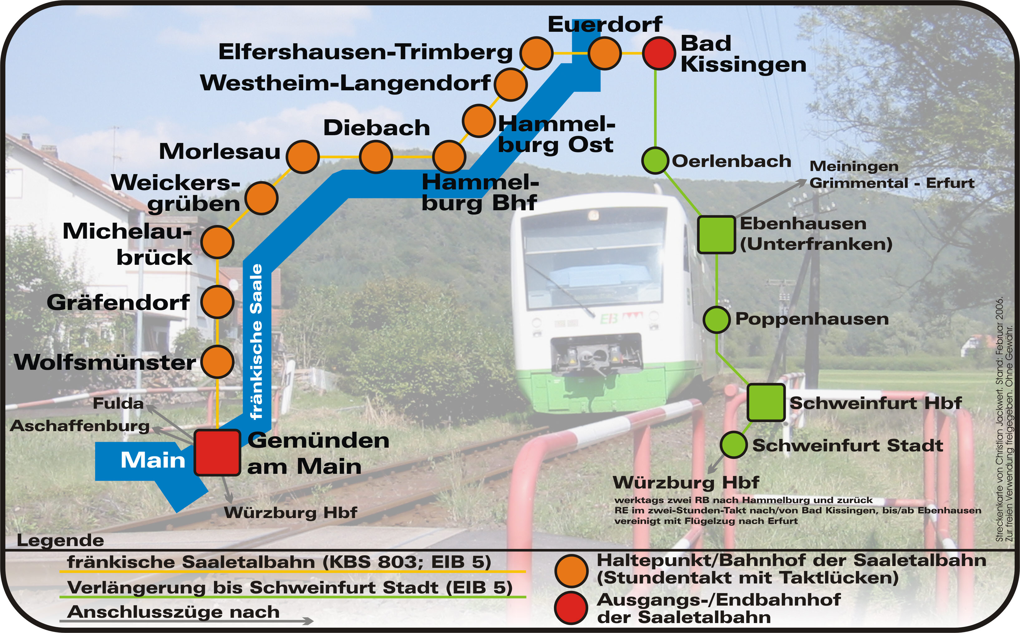 Selbsterstellte Streckenkarte für die fränkische Saaletalbahn von Gemündem (Main) nach Bad Kissingen mit Anschlüssen.